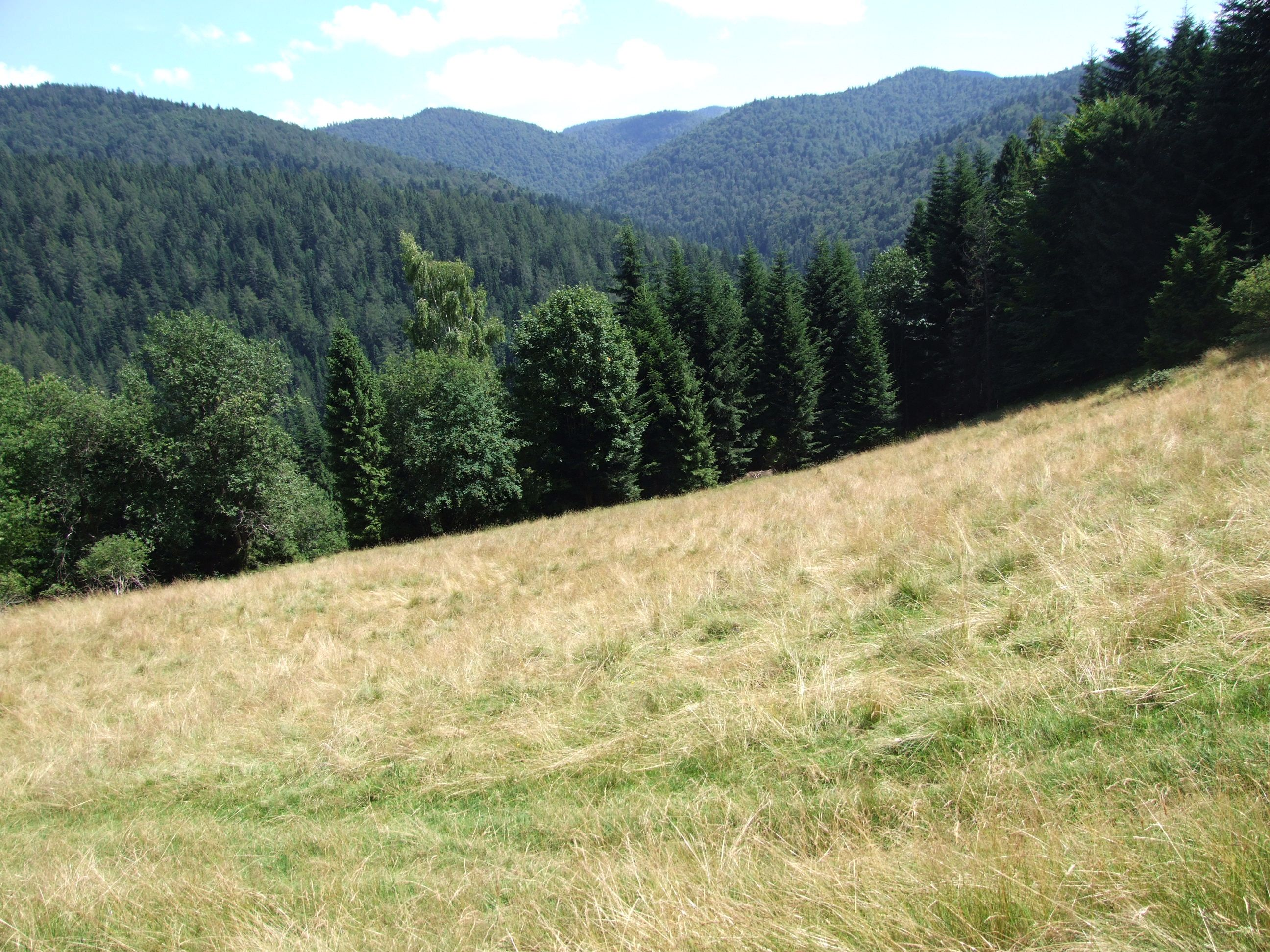 Dolina Koniny i potoku Turbacz w Gorcach